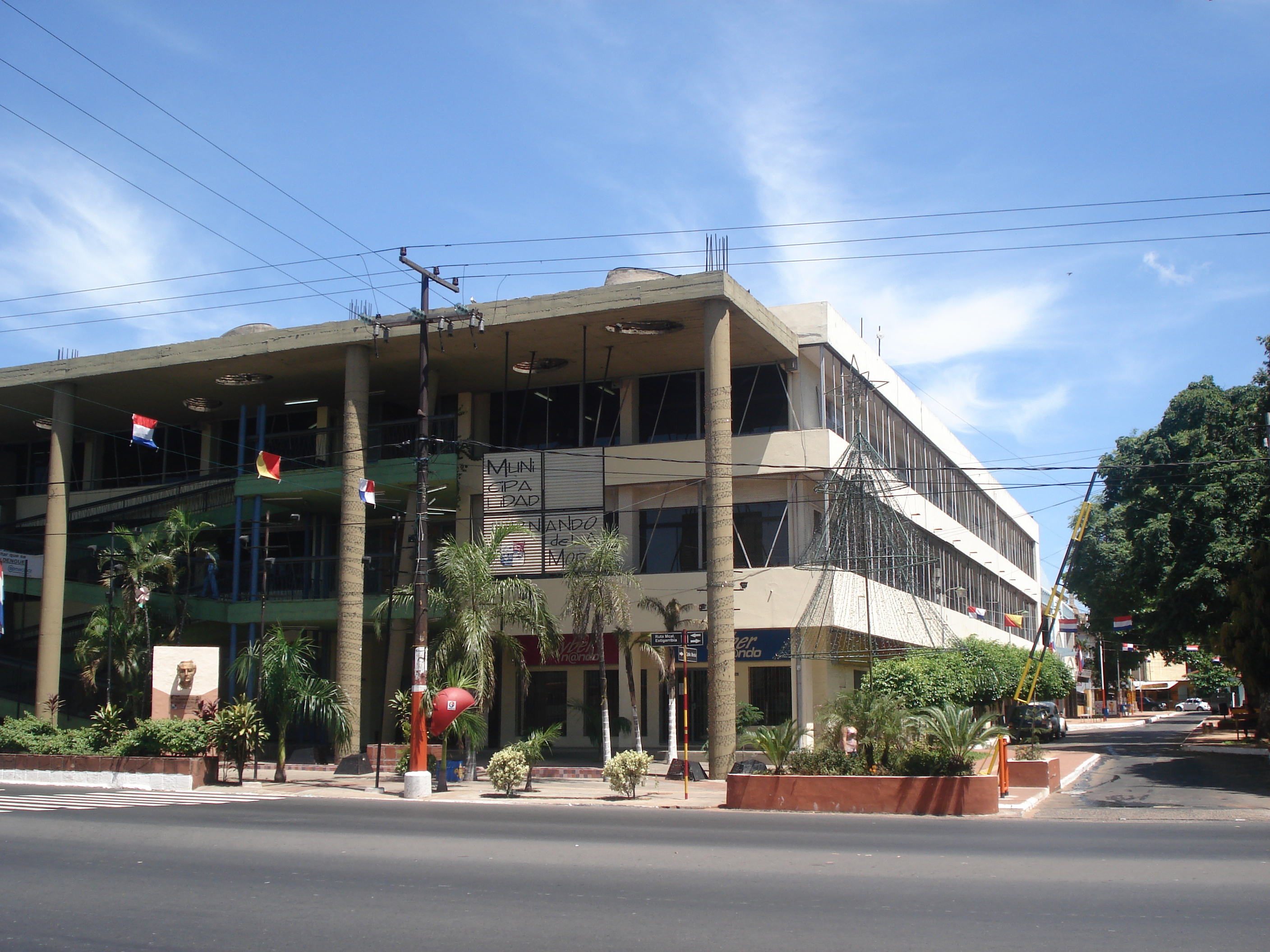 Fernando de la Mora Municipalidad